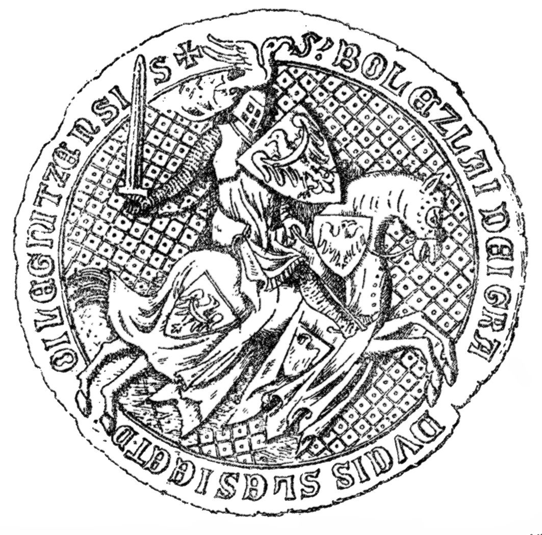 Bolesław III Rorzutny seal